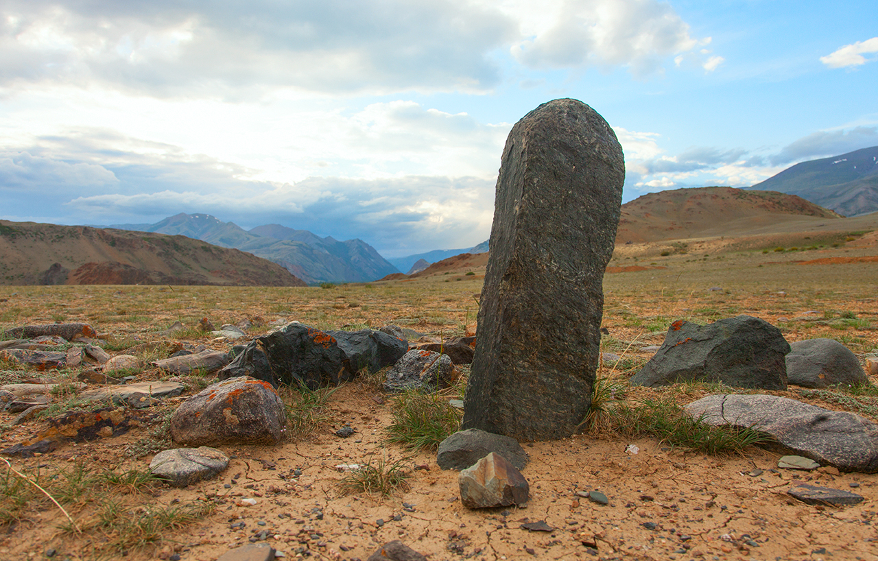 Тюрский балбал